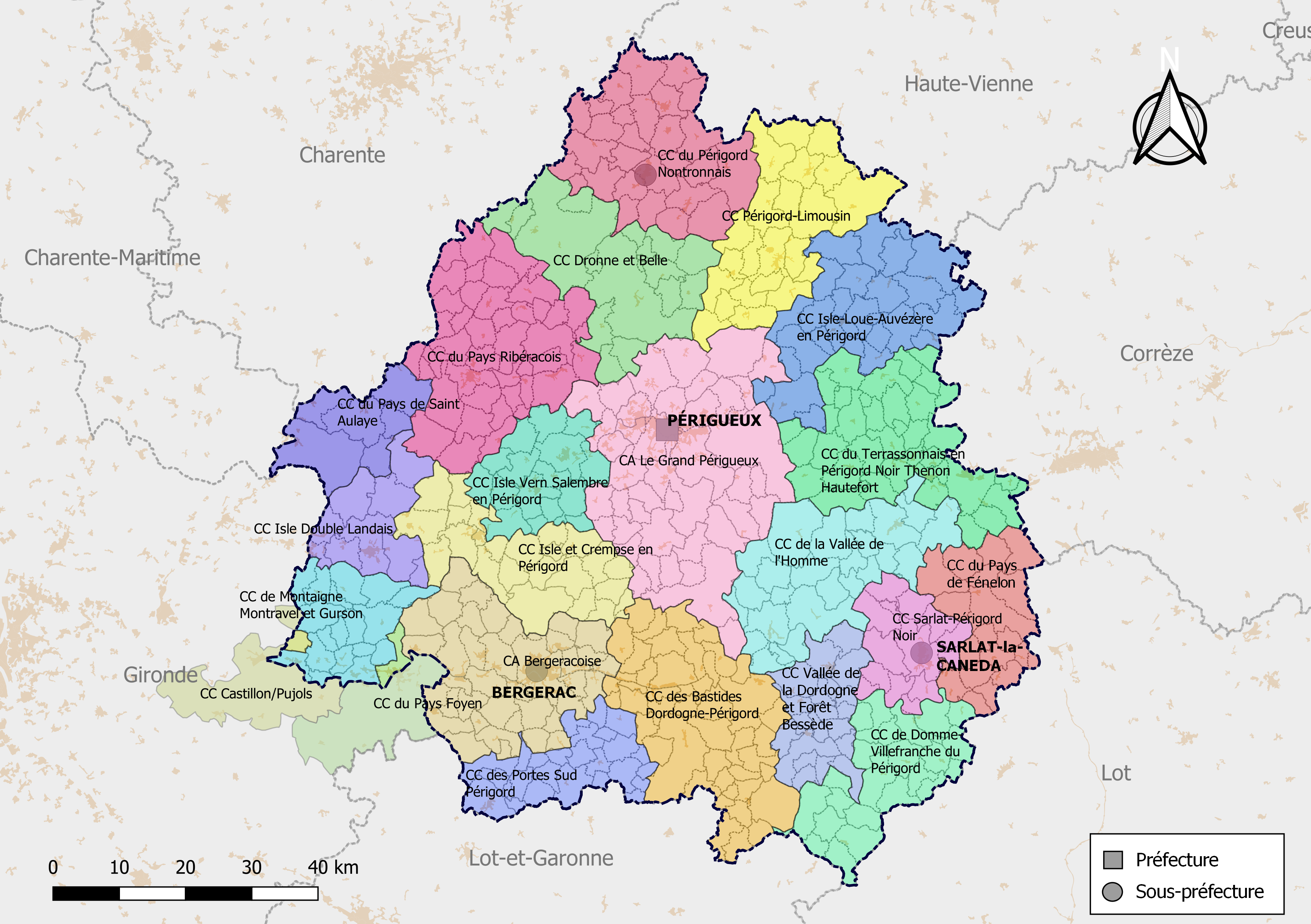 Carte des intercommunalités du département de la Dordogne, France. Composition au 1er janvier 2019.